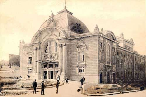 Чернівецький театр, стара світлина